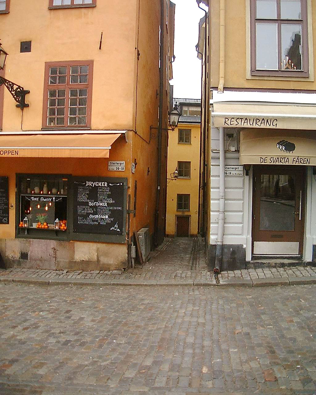 Solgränd, Gamla stan, Stockholm